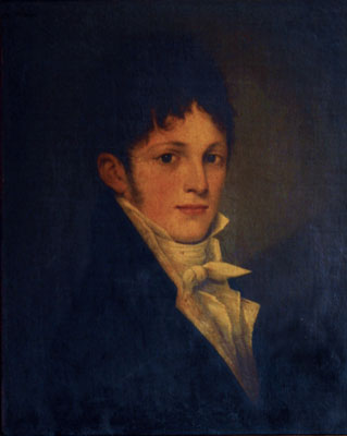 Retrato del conde Lázaro Brunetti (1781-1838), después embajador de Austria en Madrid